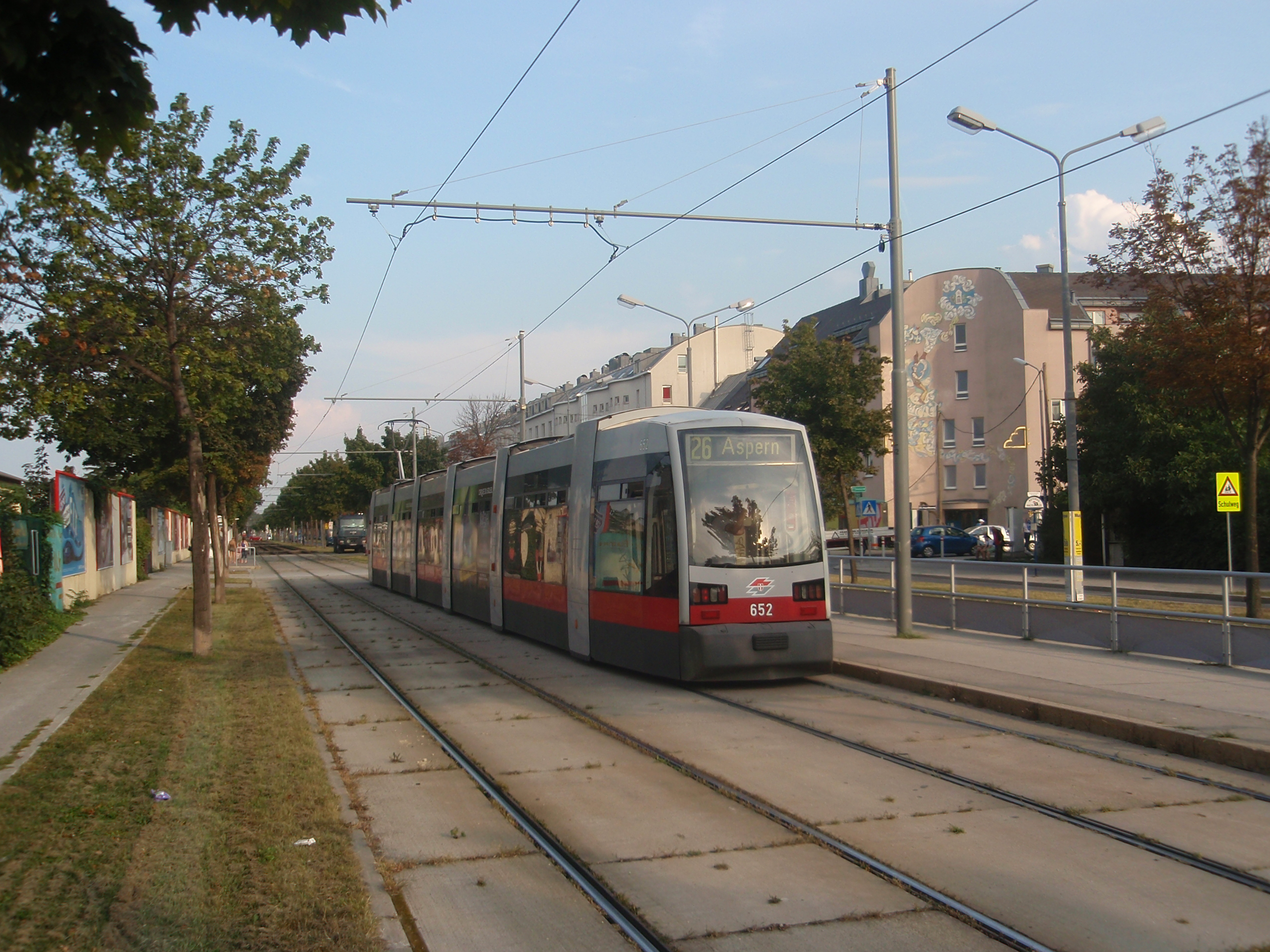 Linie 26 in Aspern